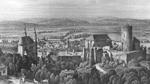 Šternberk